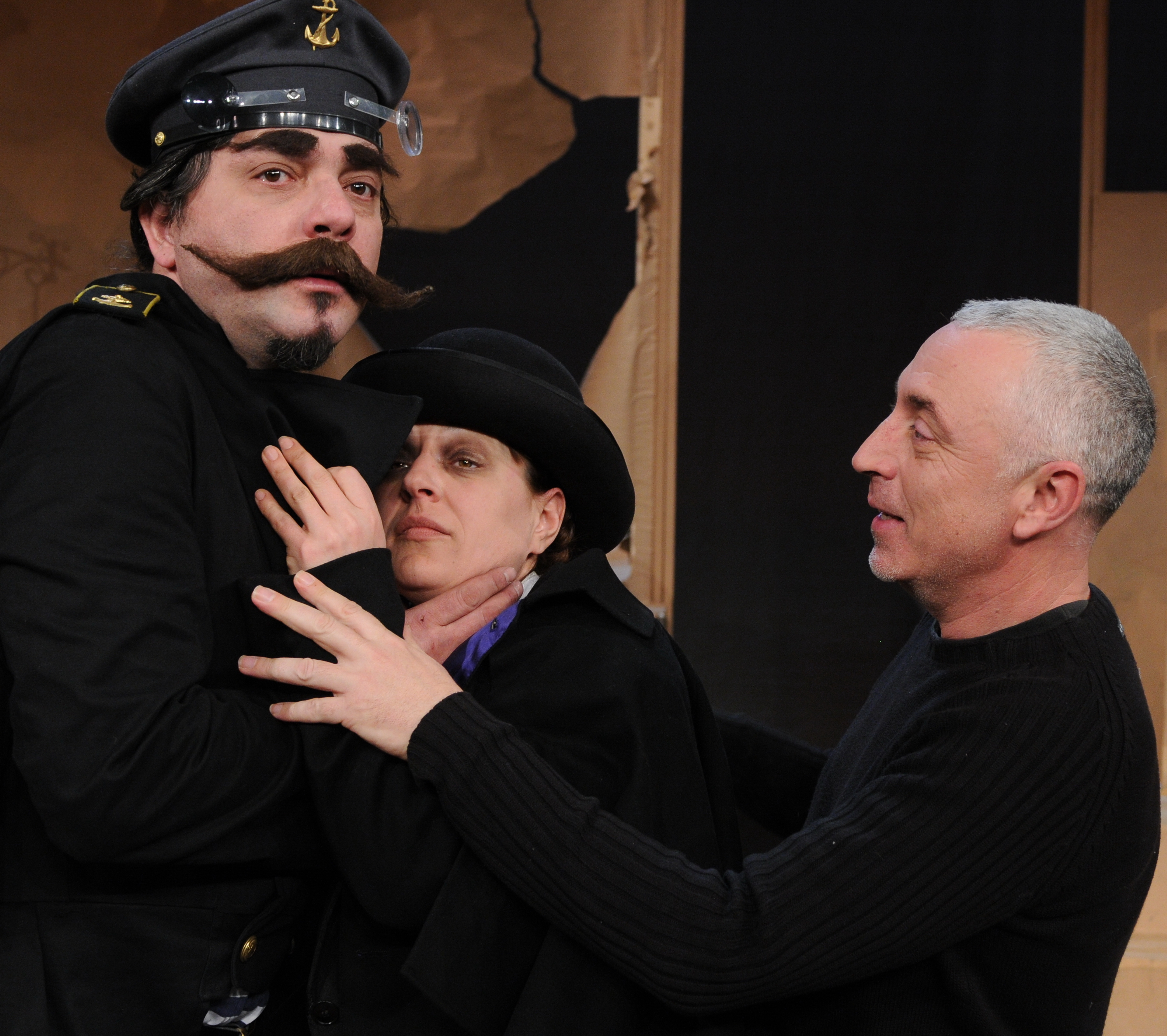 חזרות על "משרתם של שני אדונים" תיאטרון הלאומי בולגריה-צלם אטנאס קאנצ'ב 2009 (Atanas Kanchev)